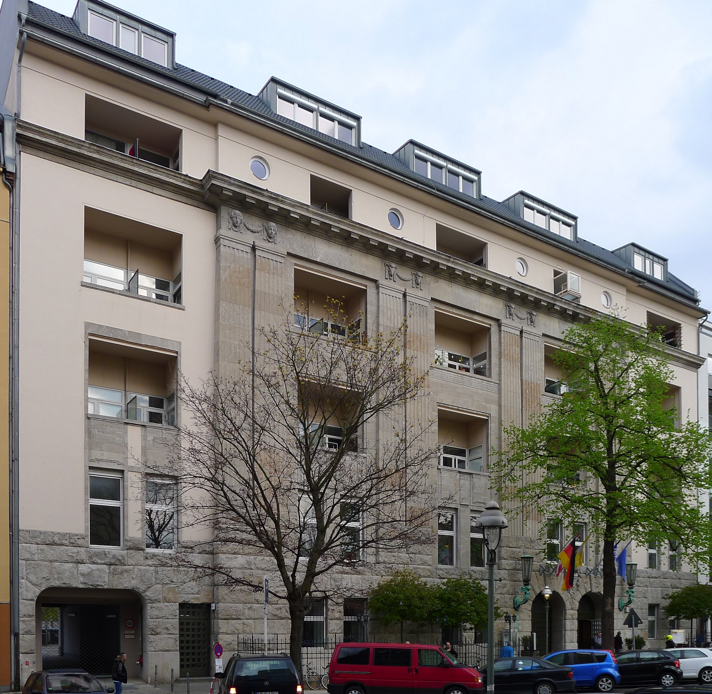 Logenhaus der Großloge der Alten Freien und Angenommenen Maurer von Deutschland, Emser Straße, Berlin